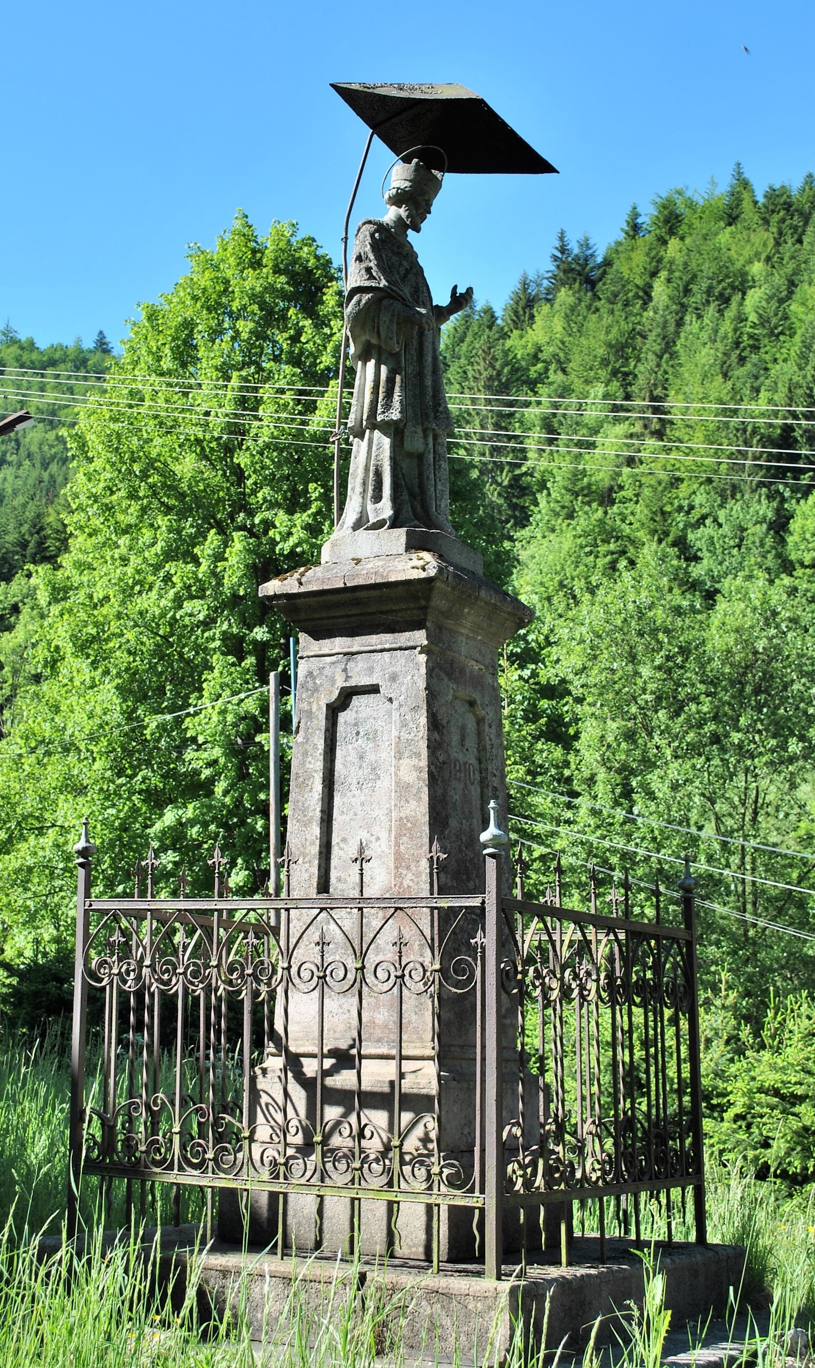 Motyčky, okres Banská Bystrica - socha sv. Jána Nepomuckého pred katolíckym kostolom